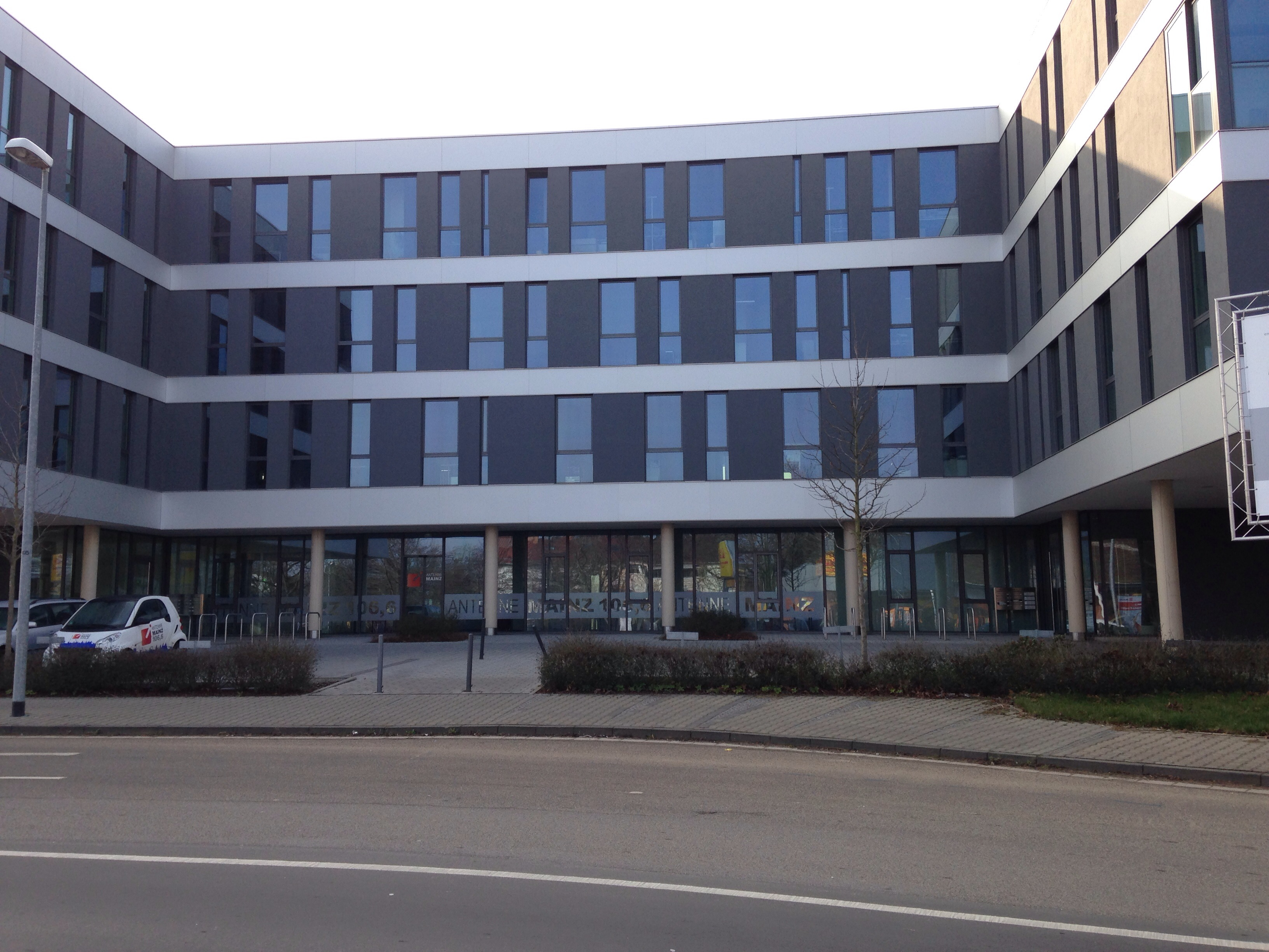 Antenne Mainz